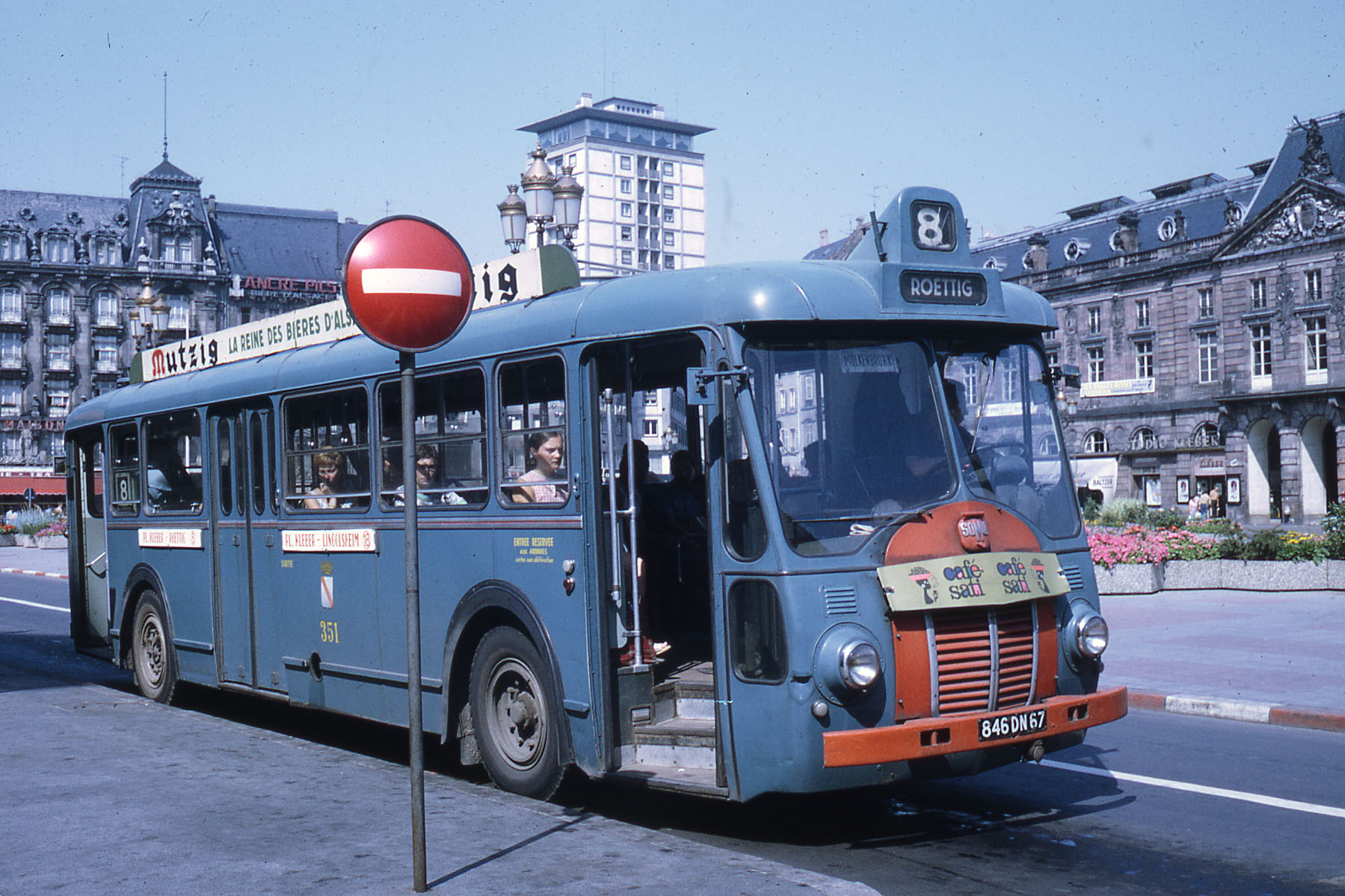 Autobus Somua type OP5/2 de la CTS, ligne 8, place Kléber Strasbourg, 1969